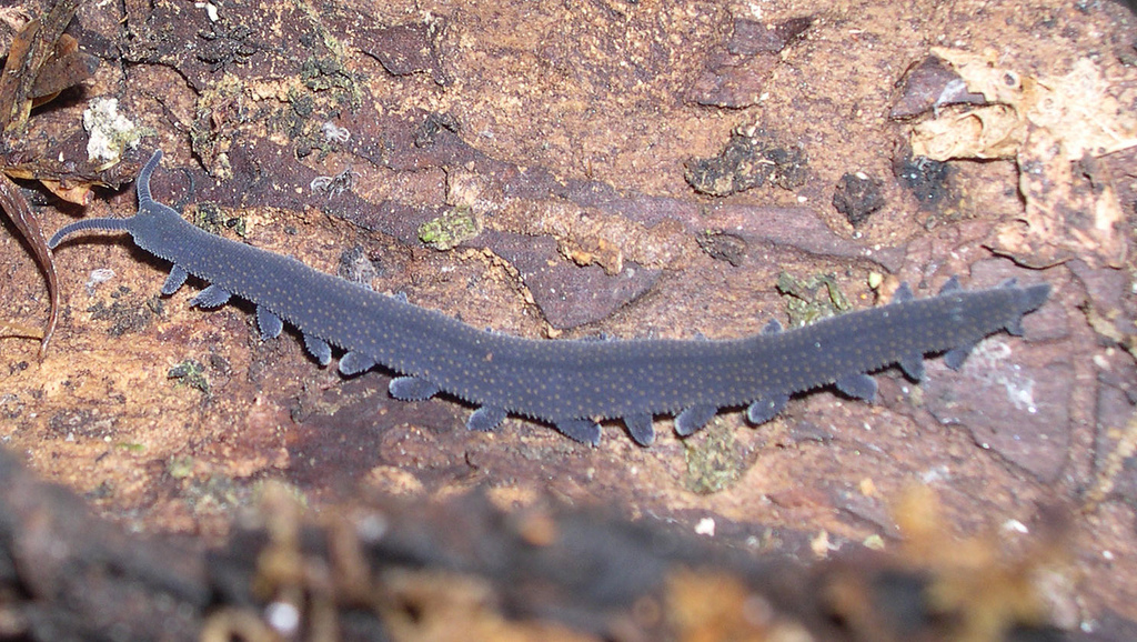 Peripatoides novaezealandiae